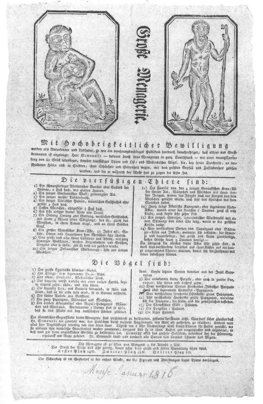 Anschlagzettel der Wandermenagerie Joseph Simonelli, 1816; Stadtbibliothek Nürnberg